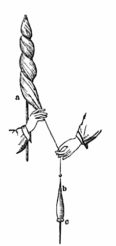 Der Spinnvorgang mit der Handspindel. a) Spinnrocken - b) Spindel - c) Spinnwirtel. Ursprüngliche Beschreibung: Abbildung des Spinnvorganges mit dem Spinnwirtel, aus Meyer's Conversationslexikon